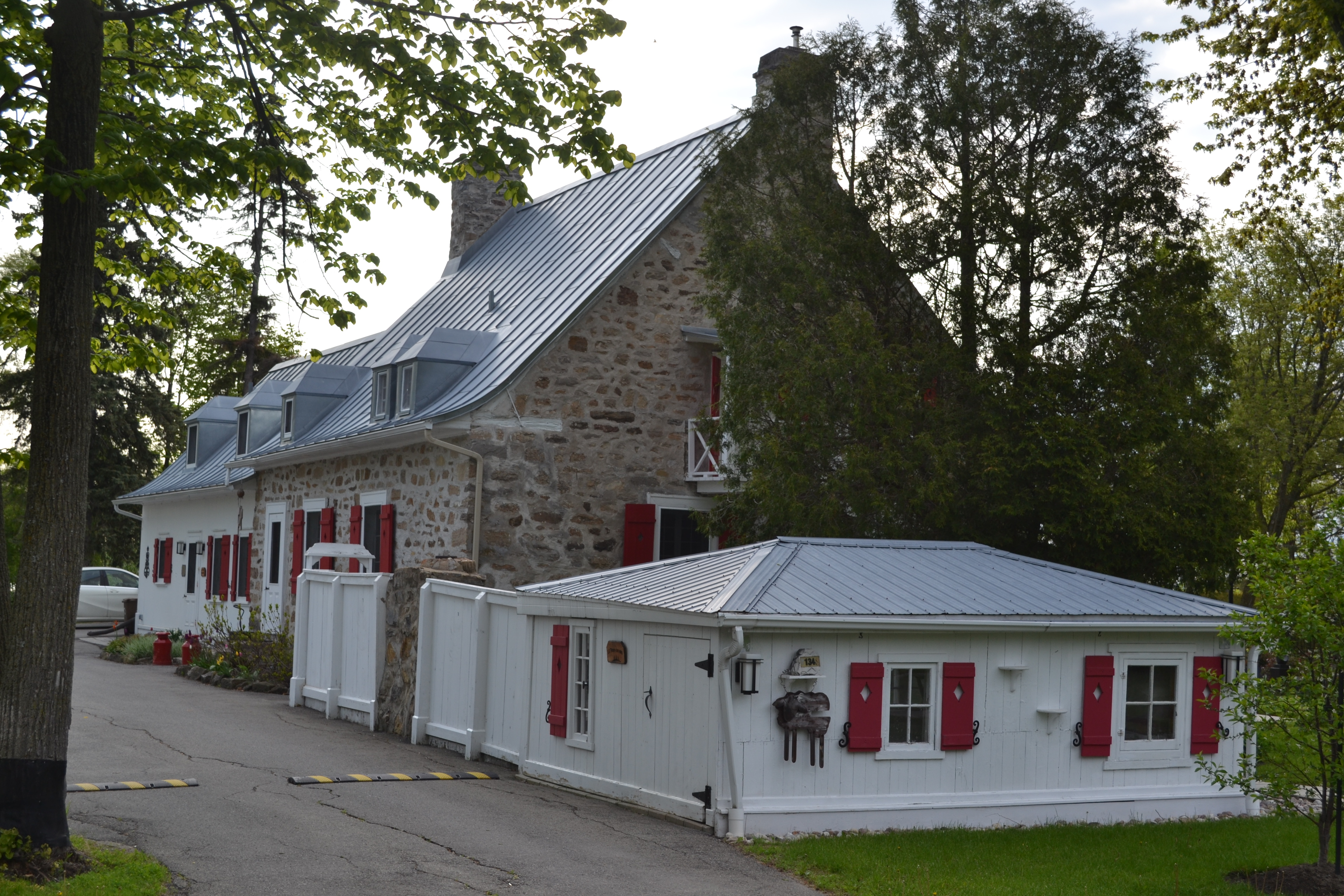 Maison Joseph-Charlebois, sise au 134 chemin du Cap-Saint-Jacques à Pierrefonds-Roxboro, Quebec